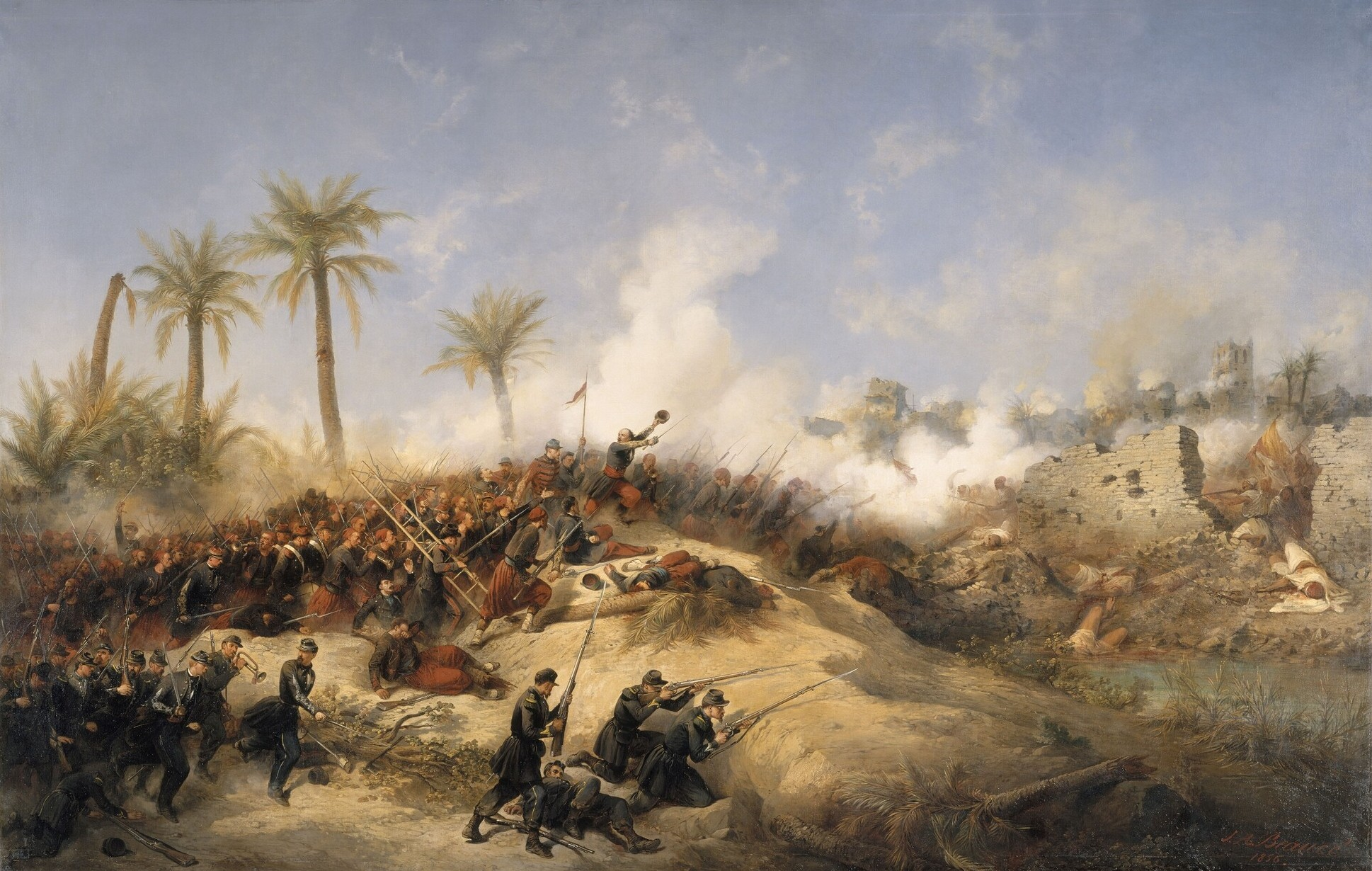 Prise de Zaatcha, 6 juillet 1836. Tableau de Jean-Adolphe Beaucé. Musée national du château de Versailles.